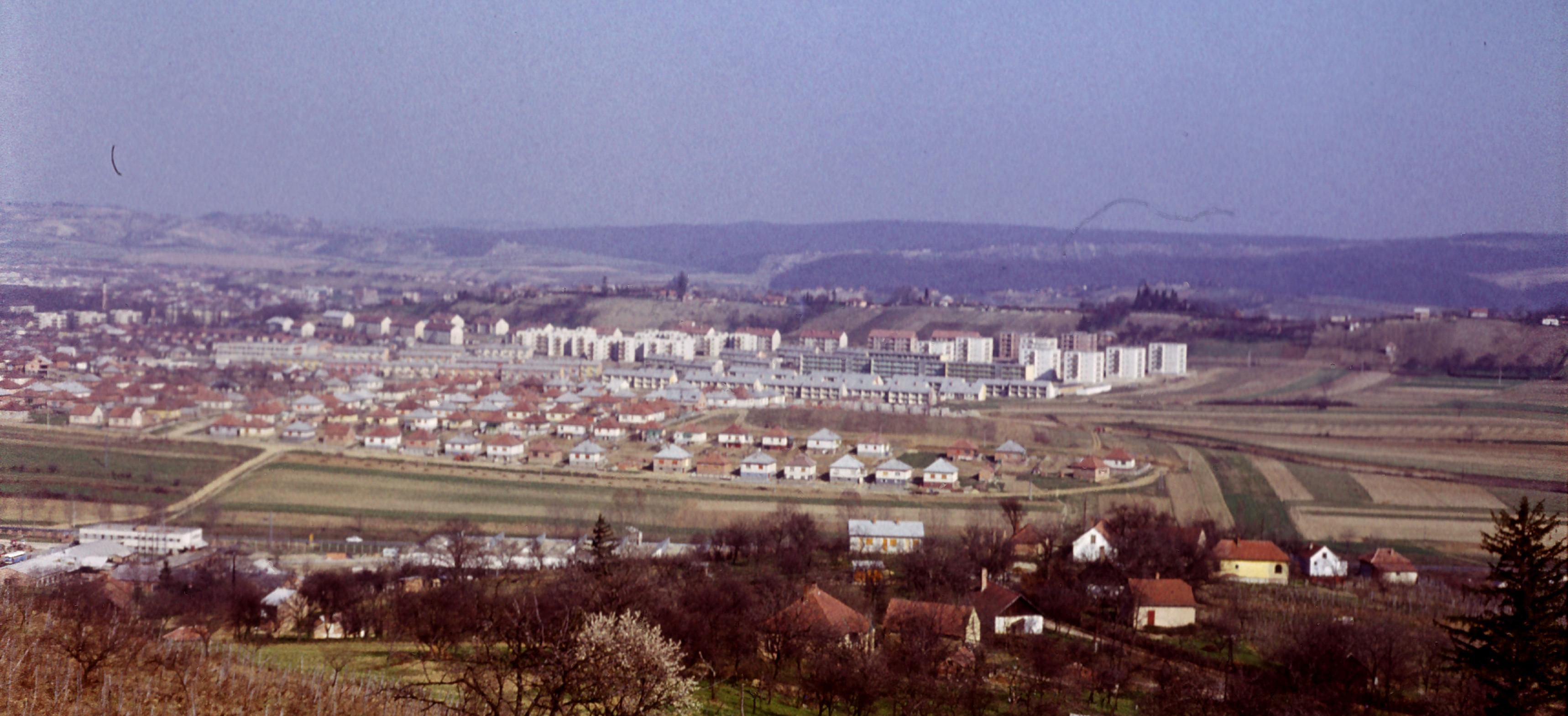 Zalaegerszeg, Kertváros lakóterület